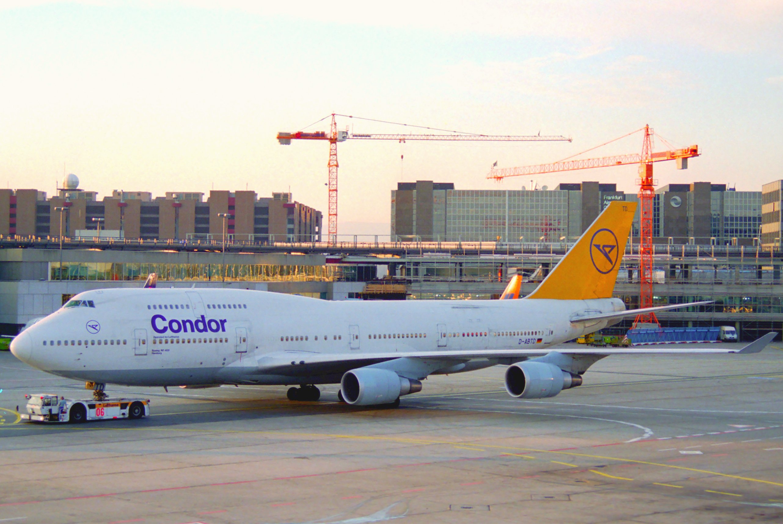 Boeing 747-430 (M); D-ABTD@FRA;10.10.1995